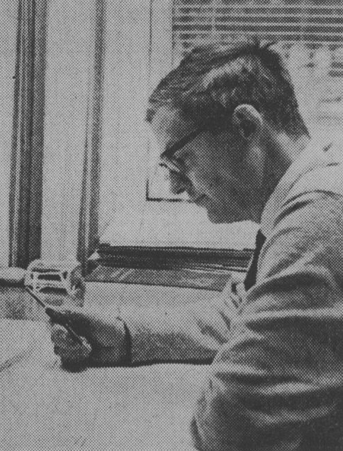 Arkitekten Arne Delborn